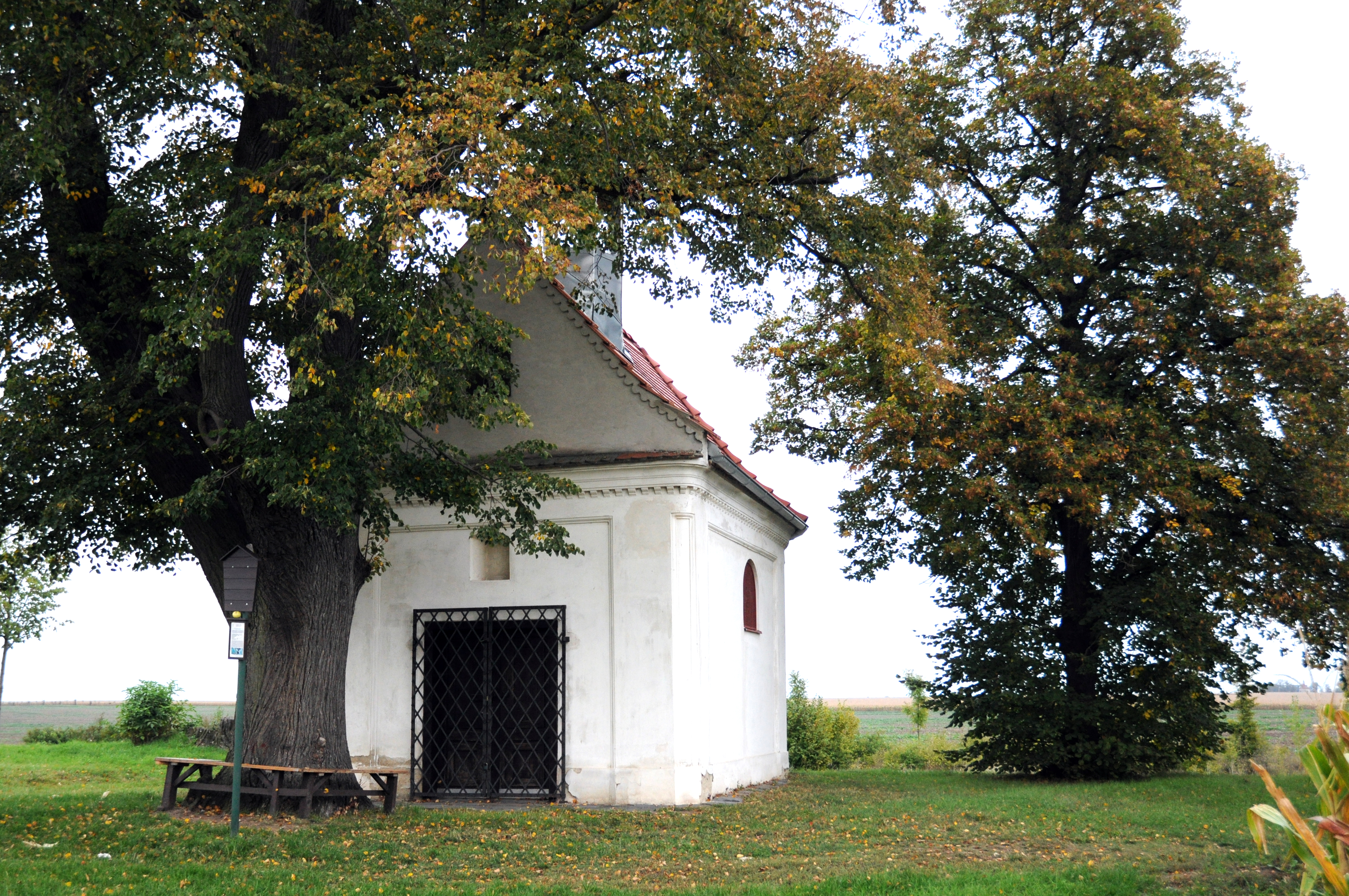 Kaple sv. Otylie (Prostějov), za obcí po levé straně silnice, Prostějov